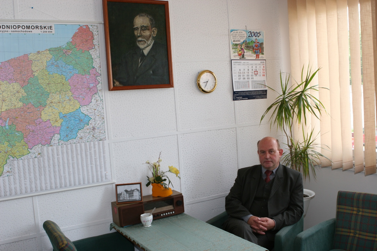 Dyrektor szpitala dr Jan Kalinowski